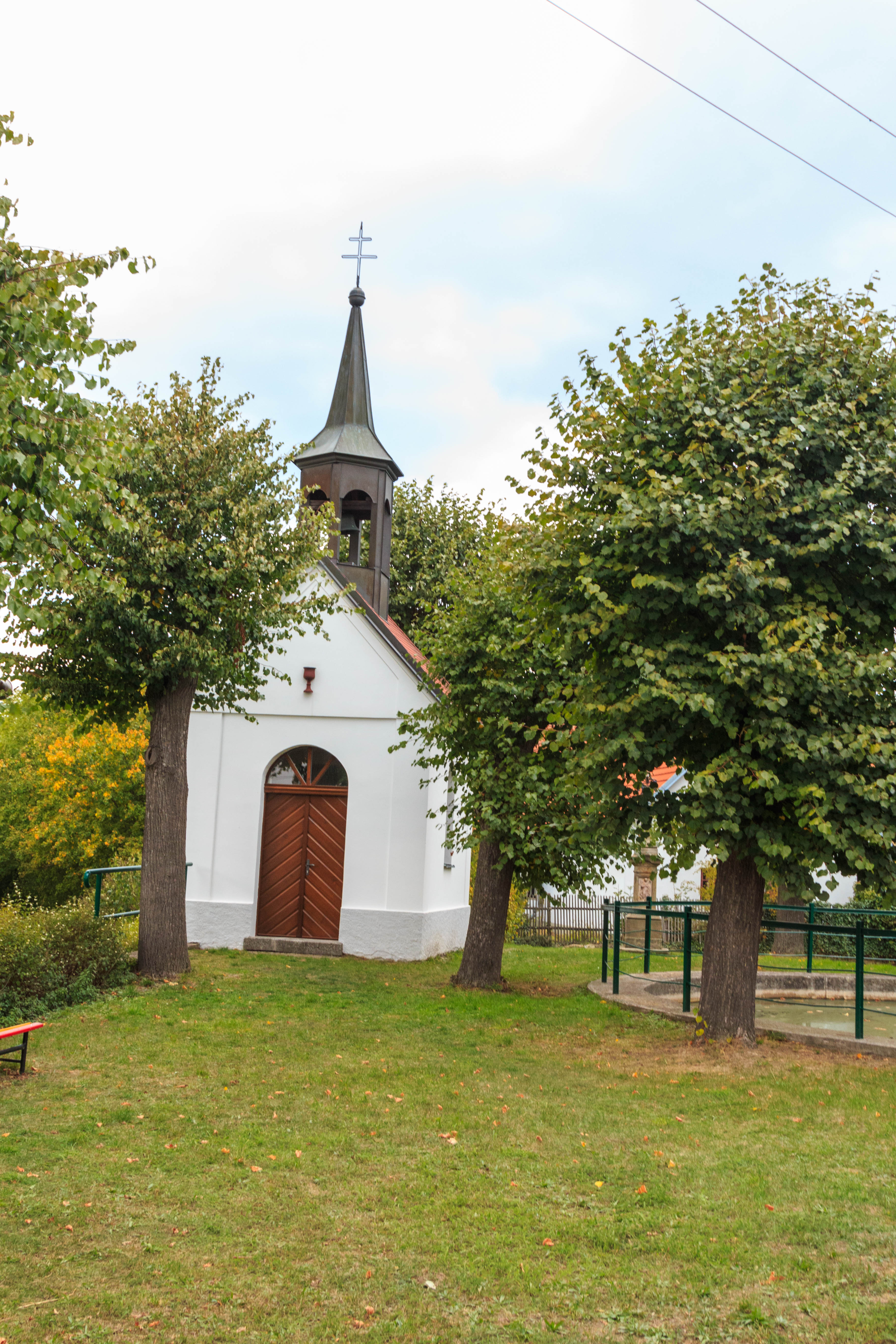 Pěšice kaple